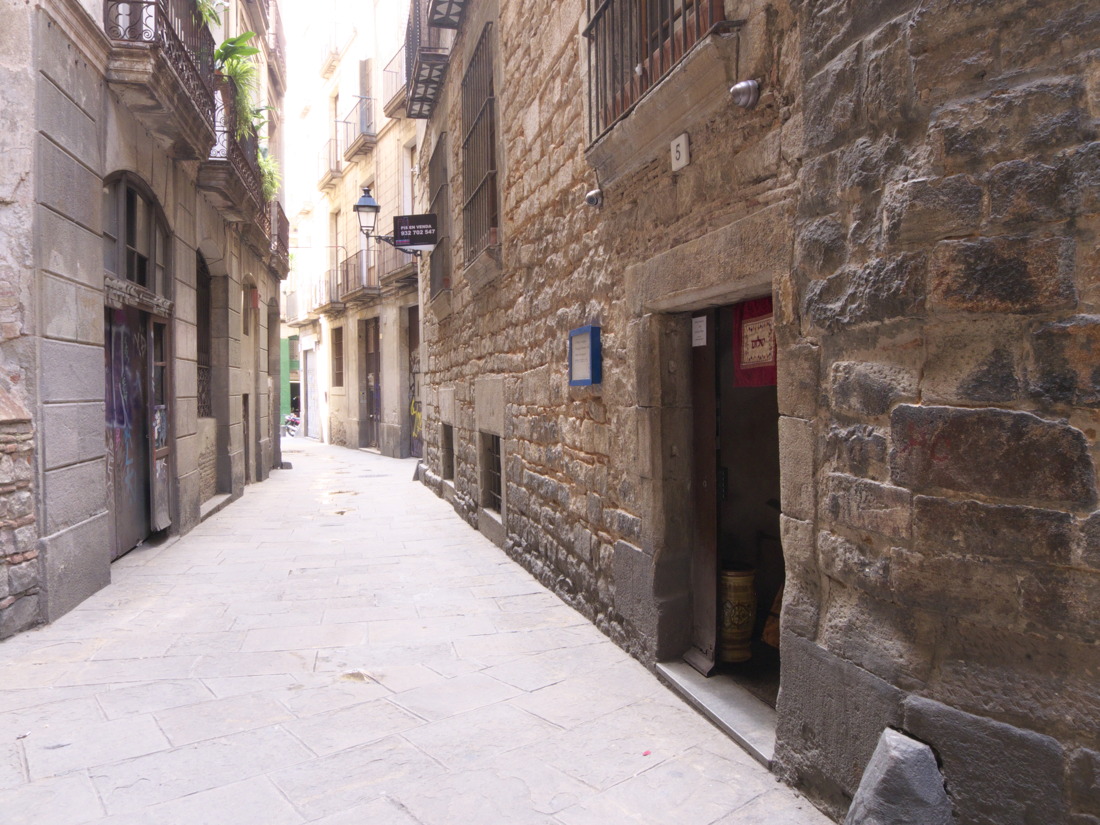 La sinagoga mayor de Barcelona (s. XIV)